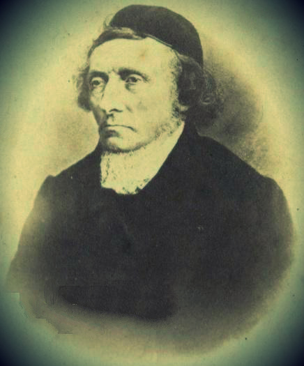 תצלום רפרודוקציה של דיוקן הרב שלמה פלסנר: הדפס חלבון בגוני חום, מודבק על גבי כרטיס בתבנית Carte de visite, בגודל 6X10 ס"מ. בתחתית התצלום נדפסה כתובת שתוכנה זהה לדברים שבפריט מספר 1, לעיל. דיוקן זה הופק על ידי הוצאת פופלאואר, ברלין (M. Poppelauers Buchhandlung, Berlin) כנראה בשנות השבעים של המאה התשע עשרה.